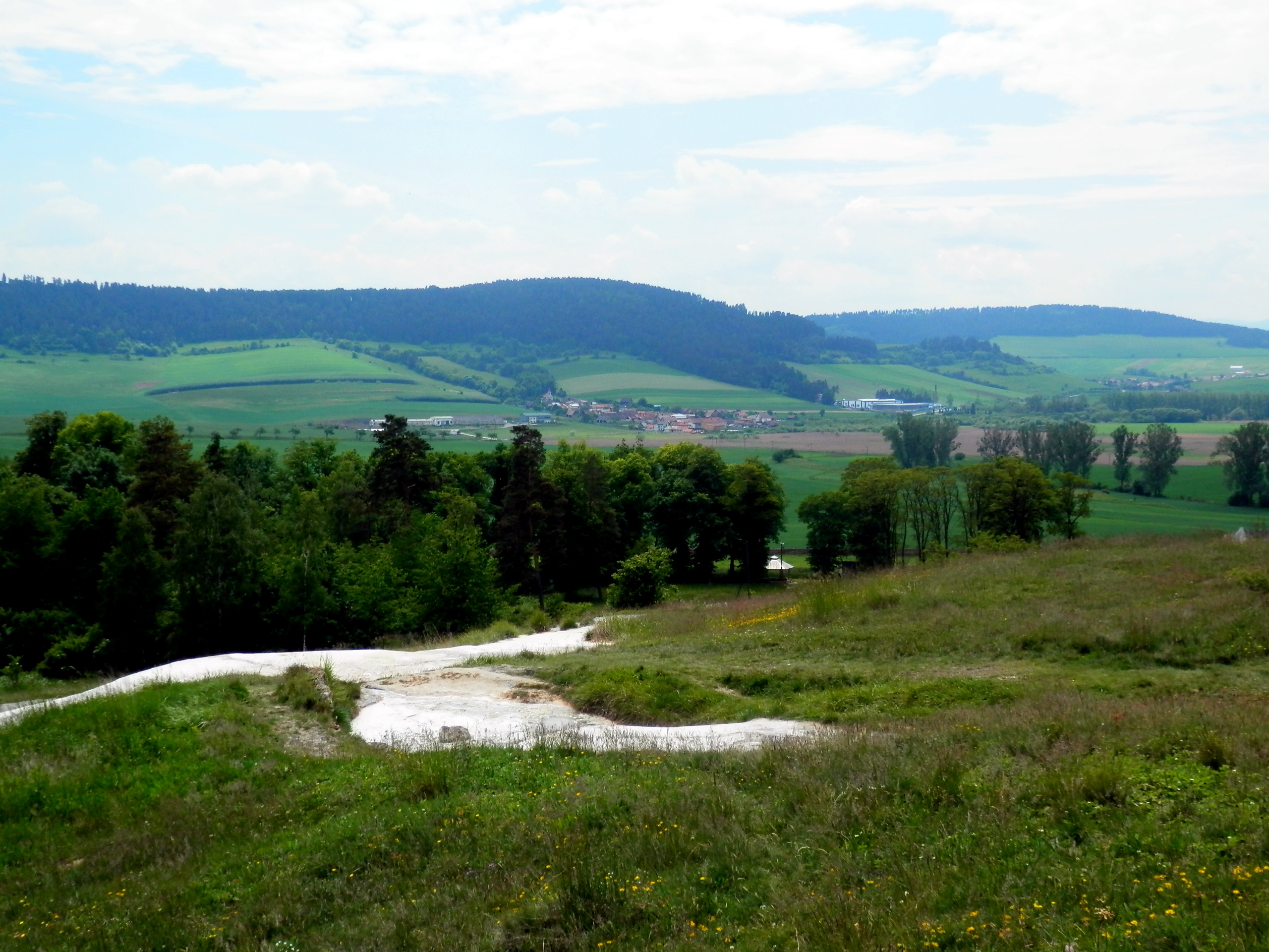 Národná prírodná rezervácia Sivá Brada, mesto Spišské Podhradie.